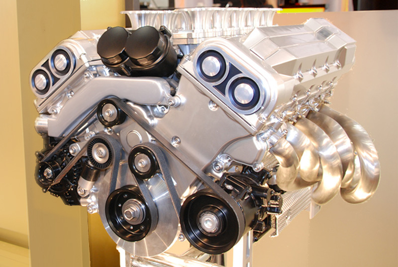 LF-A engines